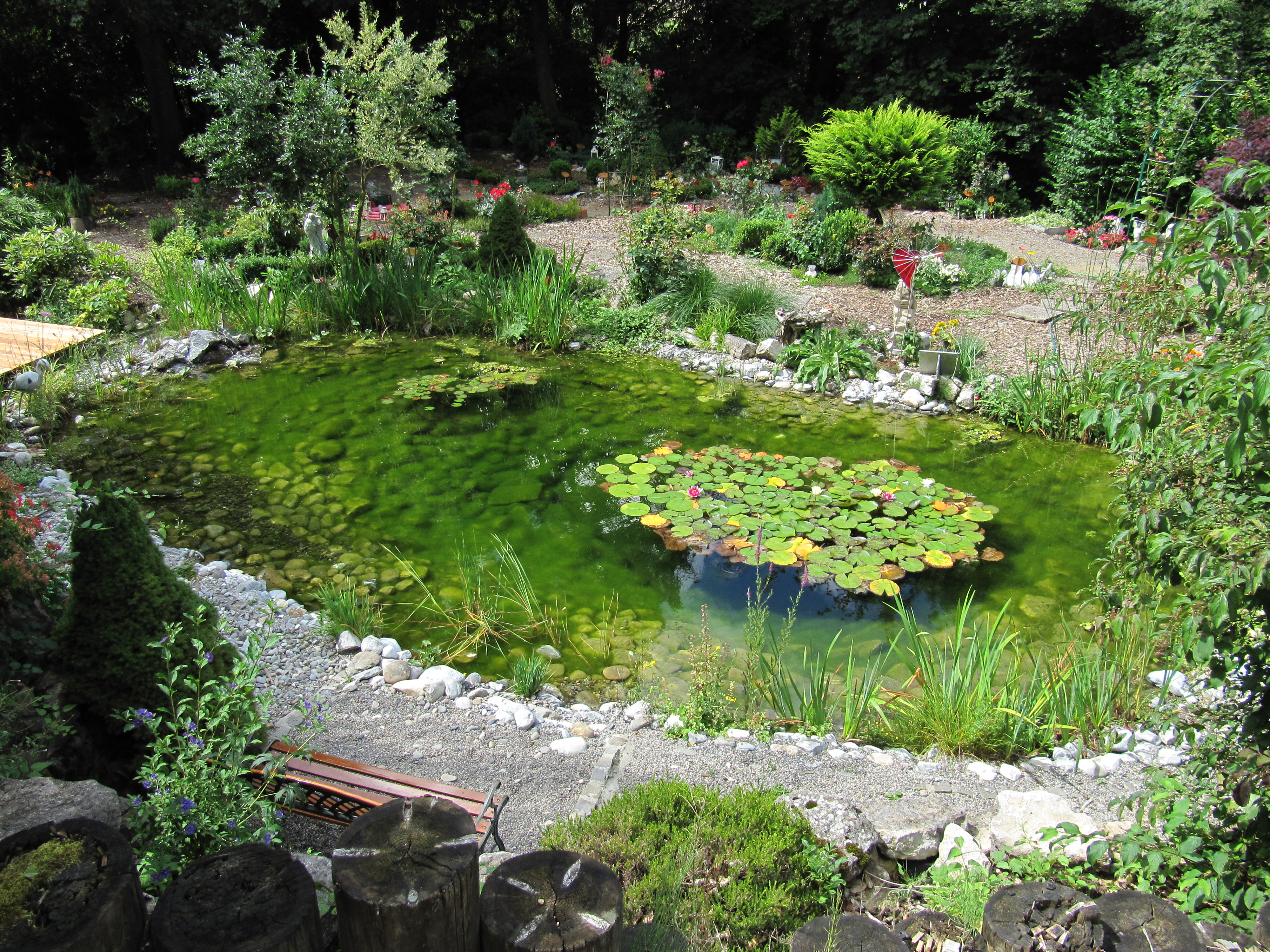 Tierfriedhof am Wisenberg, Läufelfingen BL, erster Tierfriedhof der Schweiz (2001 gegründet), Blick auf Teich